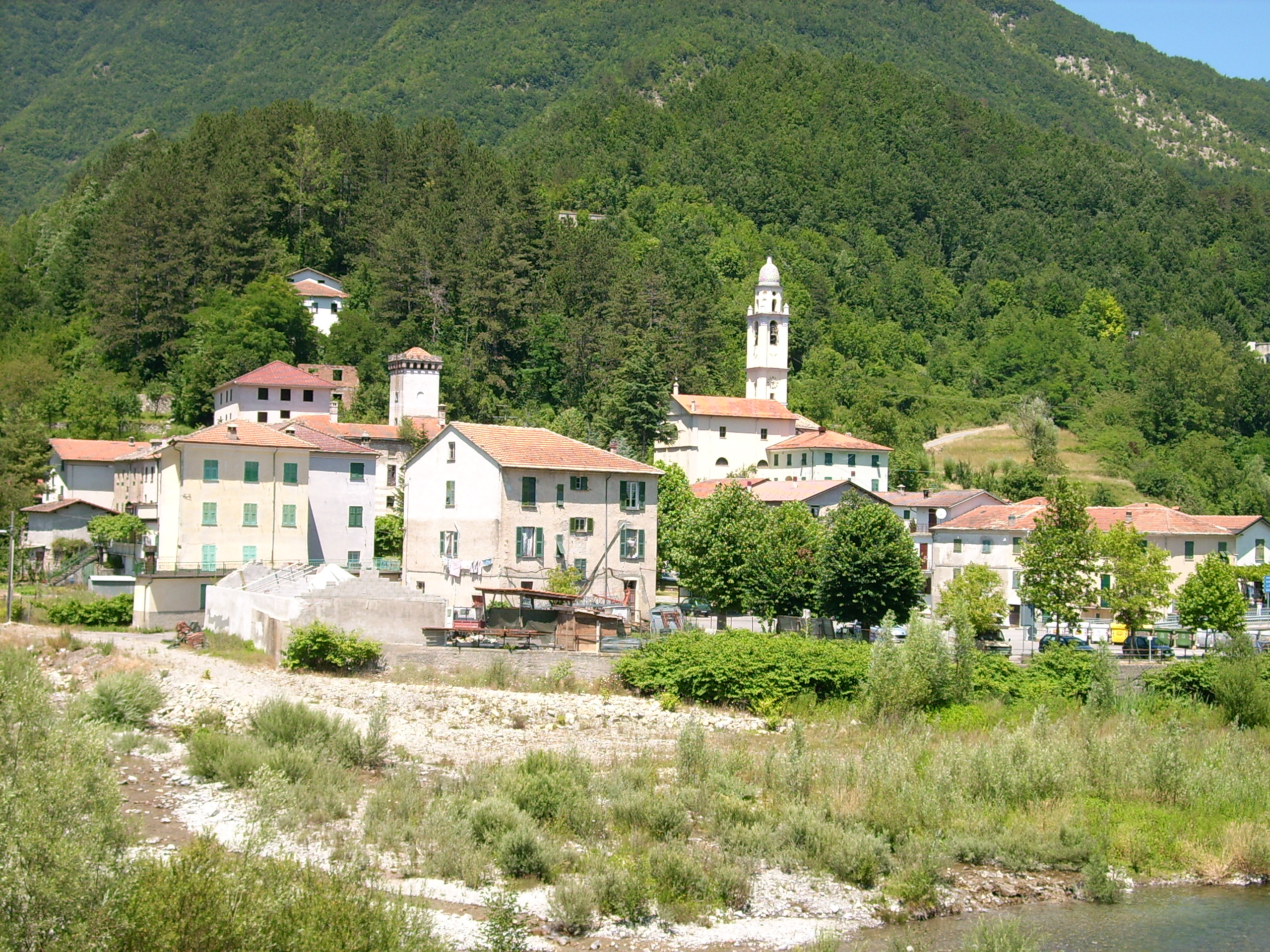 Panorama di Gorreto, Liguria, Italia